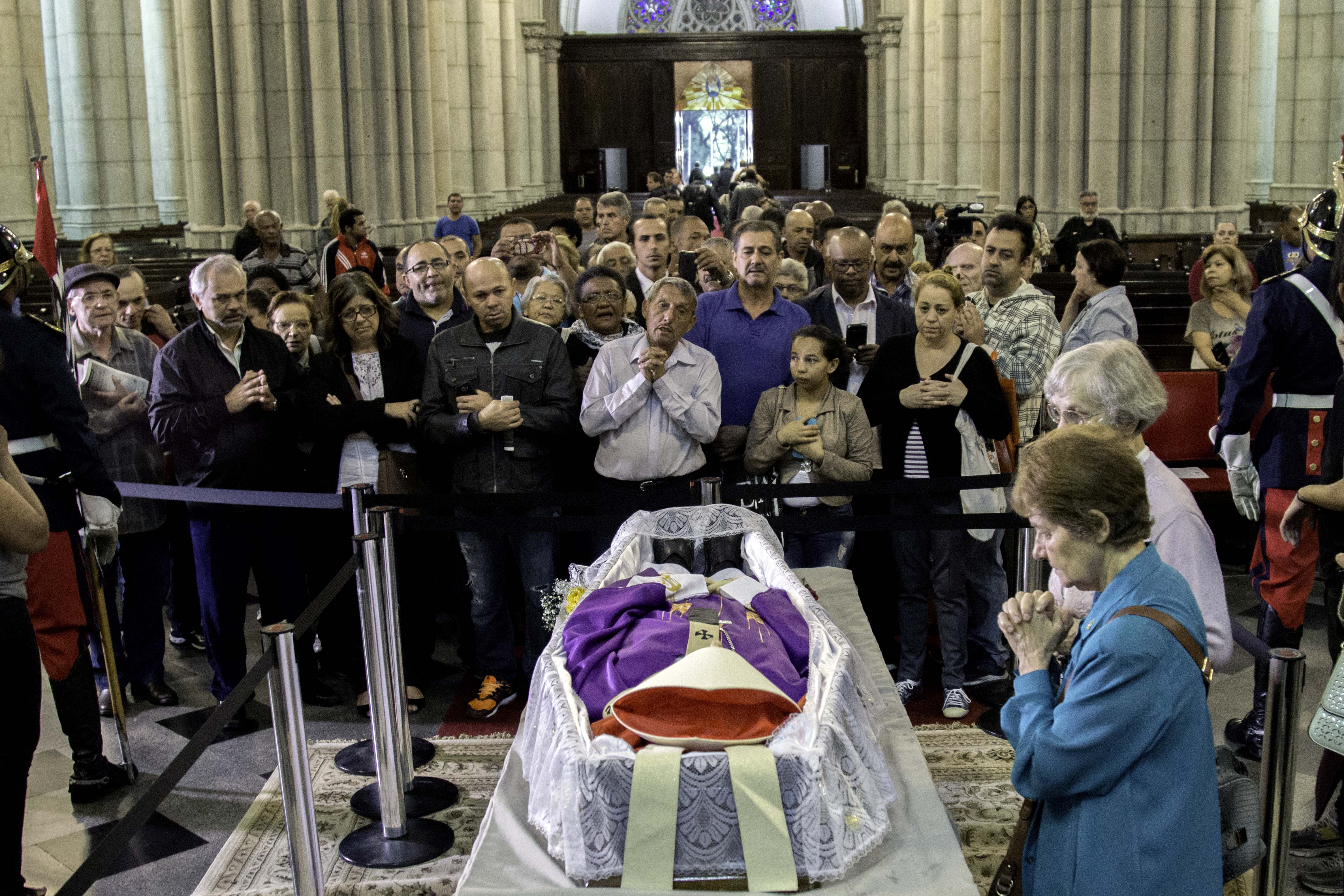 Corpo do Cardeal Dom Paulo Evaristo Arns é velado na Catedral da Sé, no centro de São Paulo (SP), quarta-feira 14 de dezembro de 2016. Ele estava internado no Hospital Santa Catarina em decorrência de uma broncopneumonia e morreu na manhã de quarta-feira 14 de dezembro de 2016. Arns tinha 95 anos.